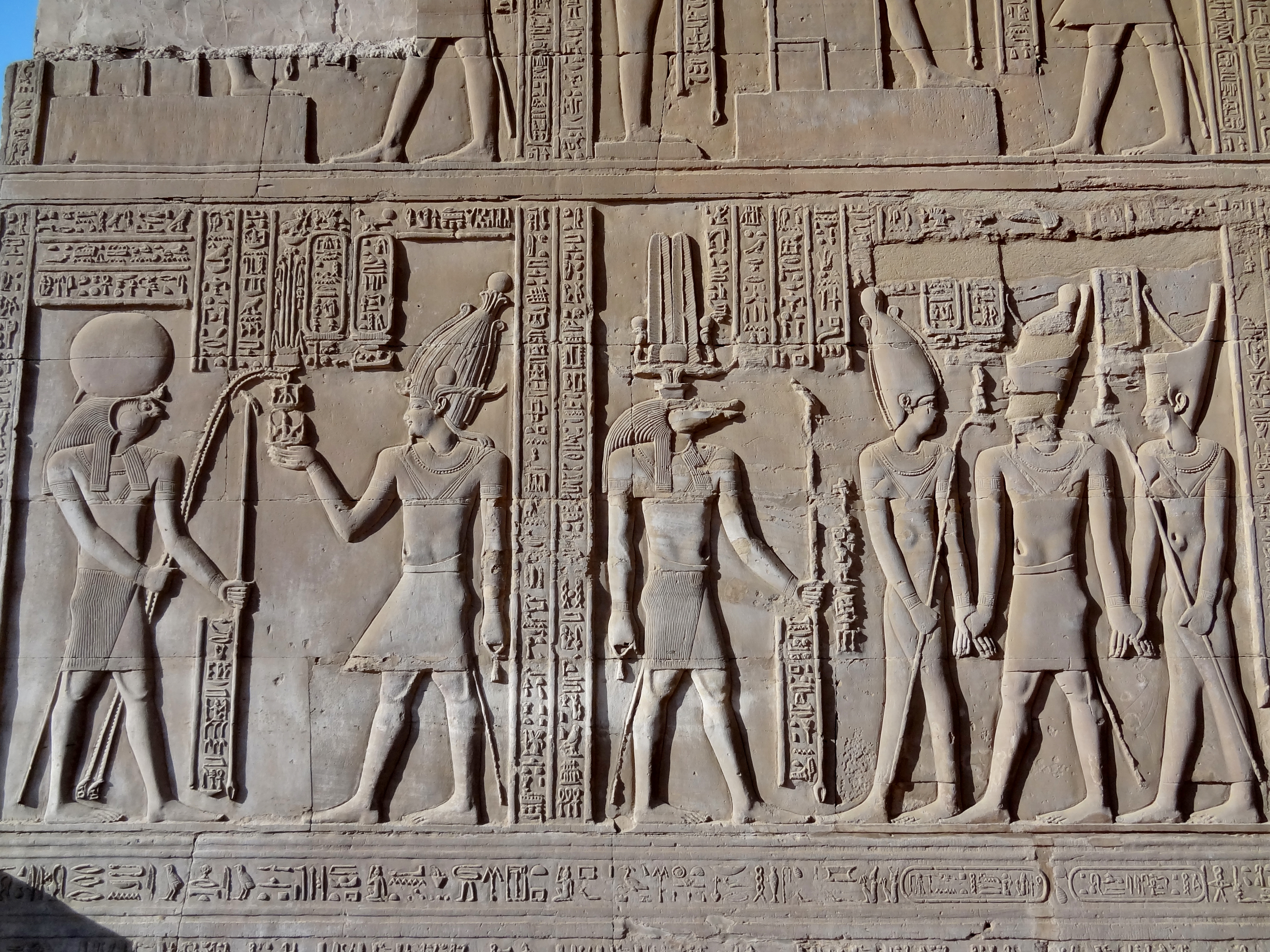 Relief im Tempel von Kom Ombo, Ägypten